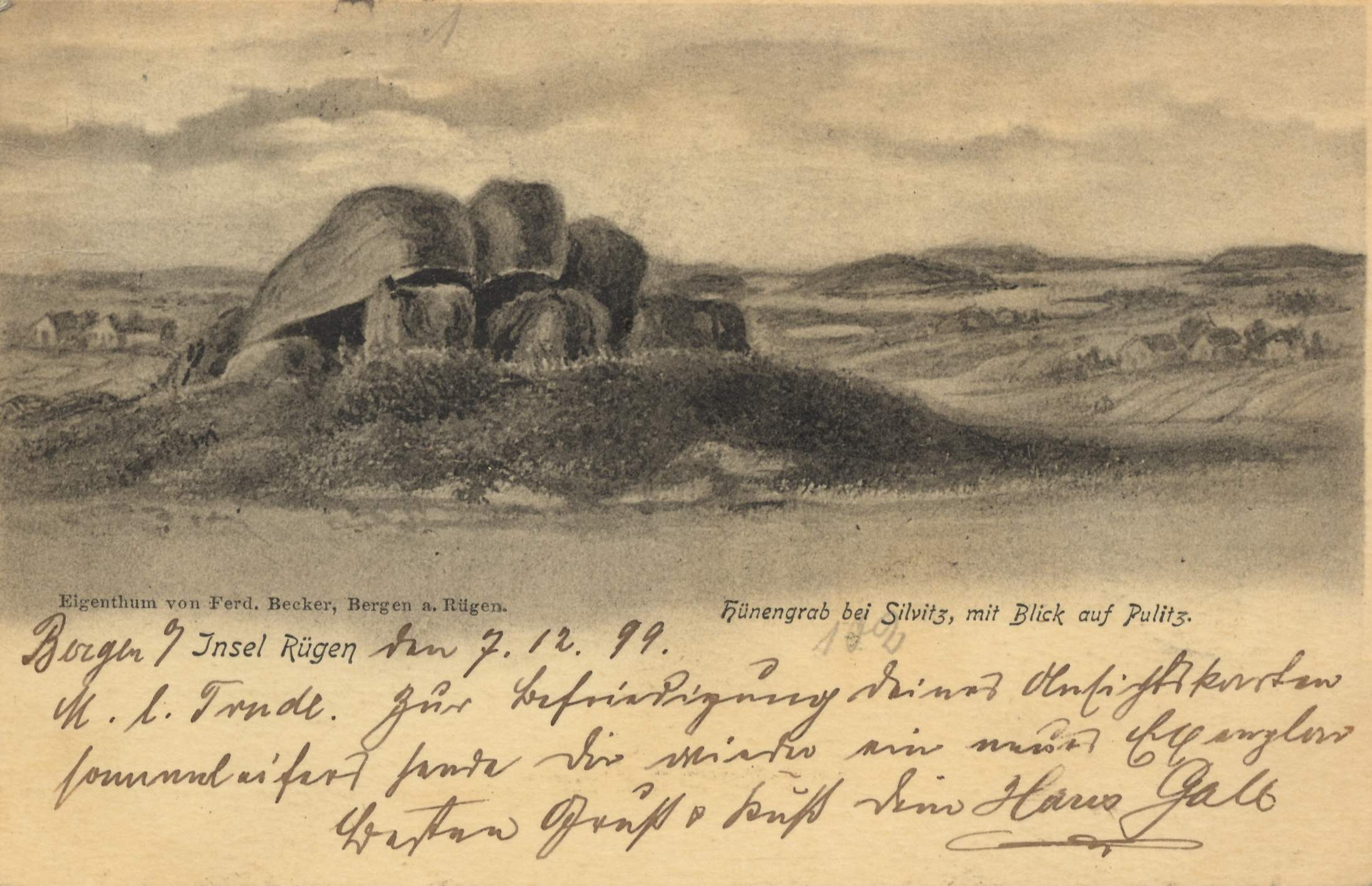 Insel Rügen. Hünengrab bei Silvitz, mit Blick auf Pulitz